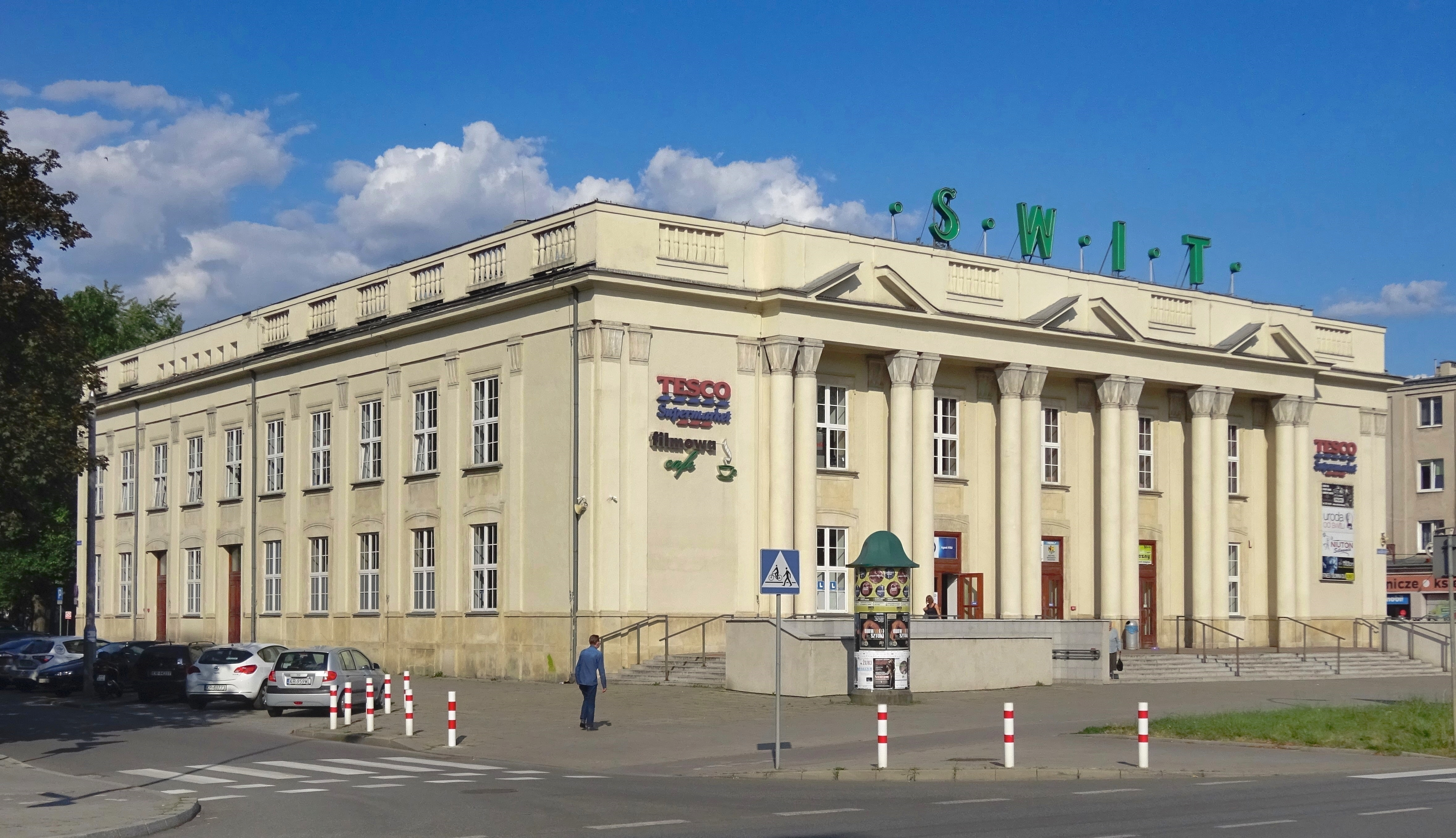 Kino Świt w Krakowie na osiedlu Teatralnym. Widok od zachodu, od al. gen. Andersa. 2019